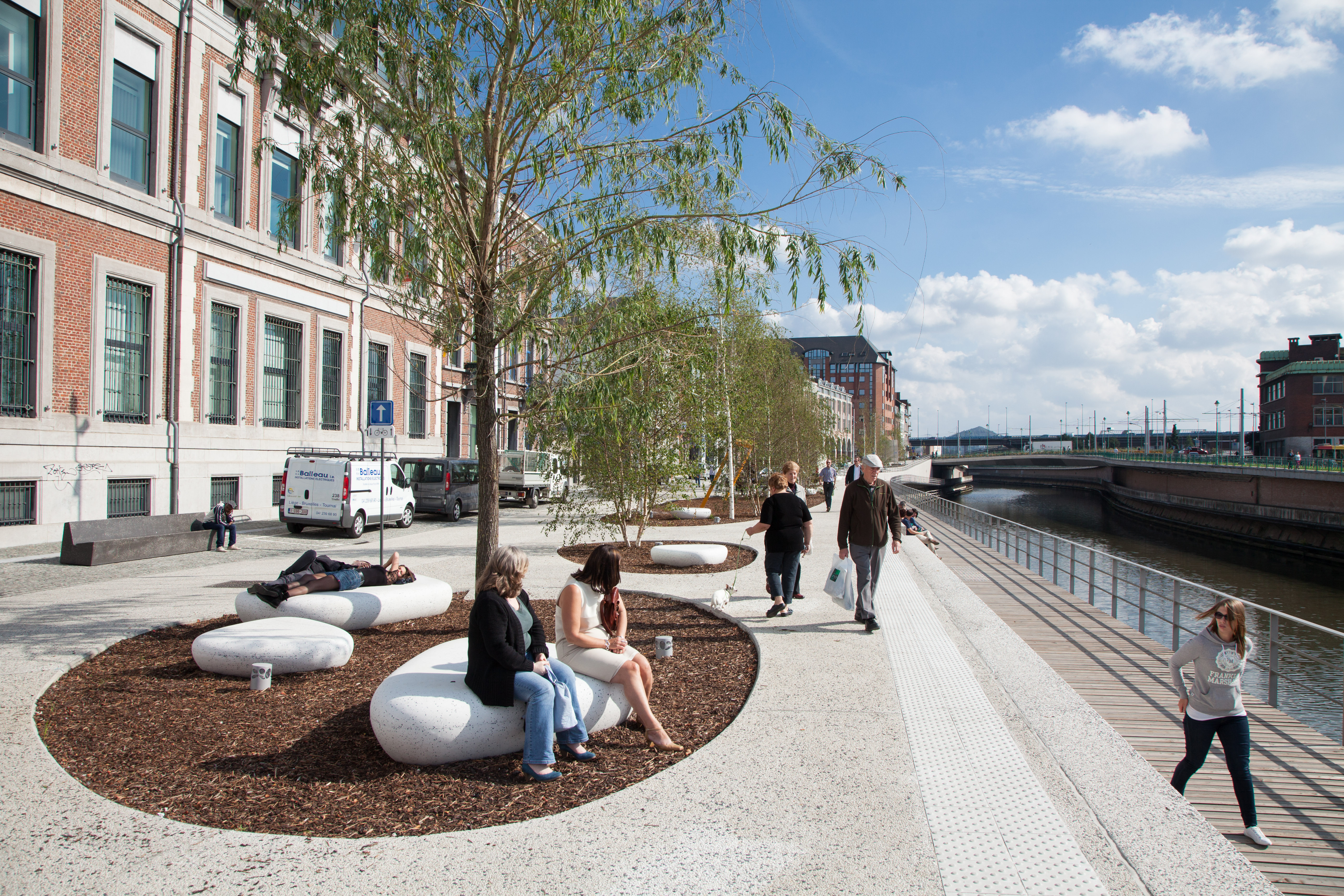 Pause-midi sur les nouveaux quais de Sambre dans le cadre des travaux Rive Gauche, anciennement les quais de Brabant, Charleroi 01/10/2014